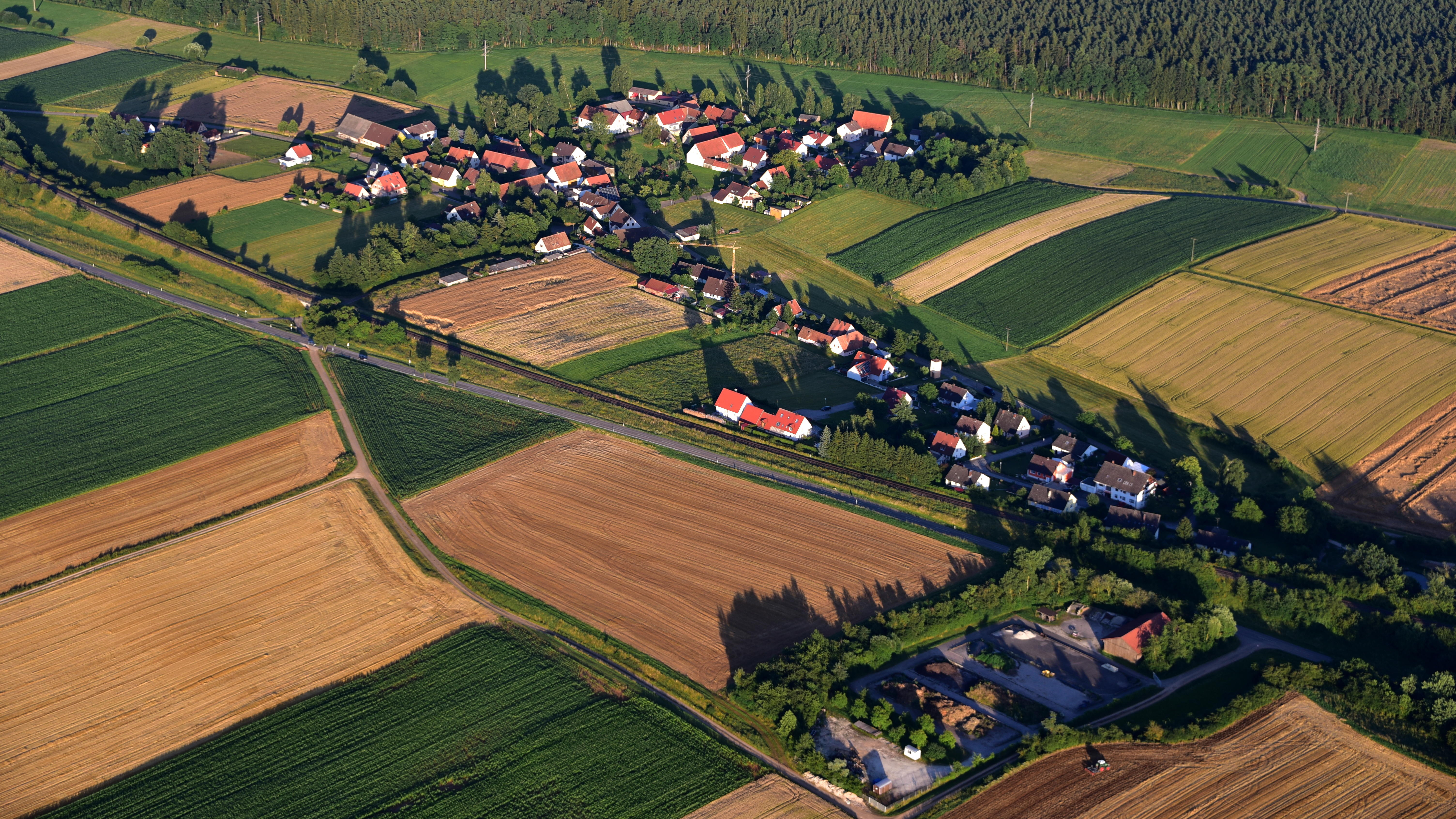 Oberwurmbach, Luftaufnahme (2016)